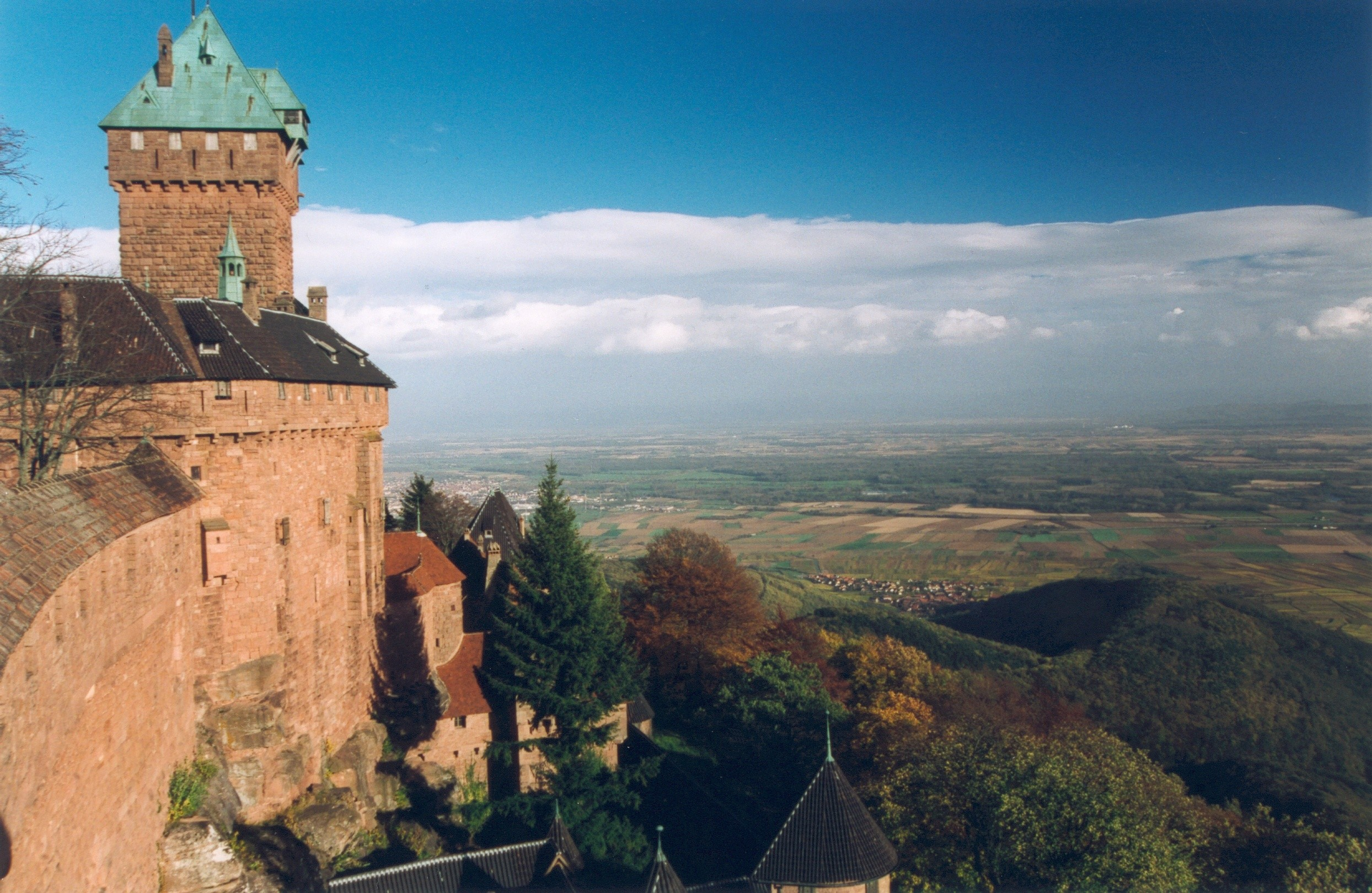 Haut-Kœnigsbourg Bas-Rhin France Le château Photographie prise par Patrick GIRAUD